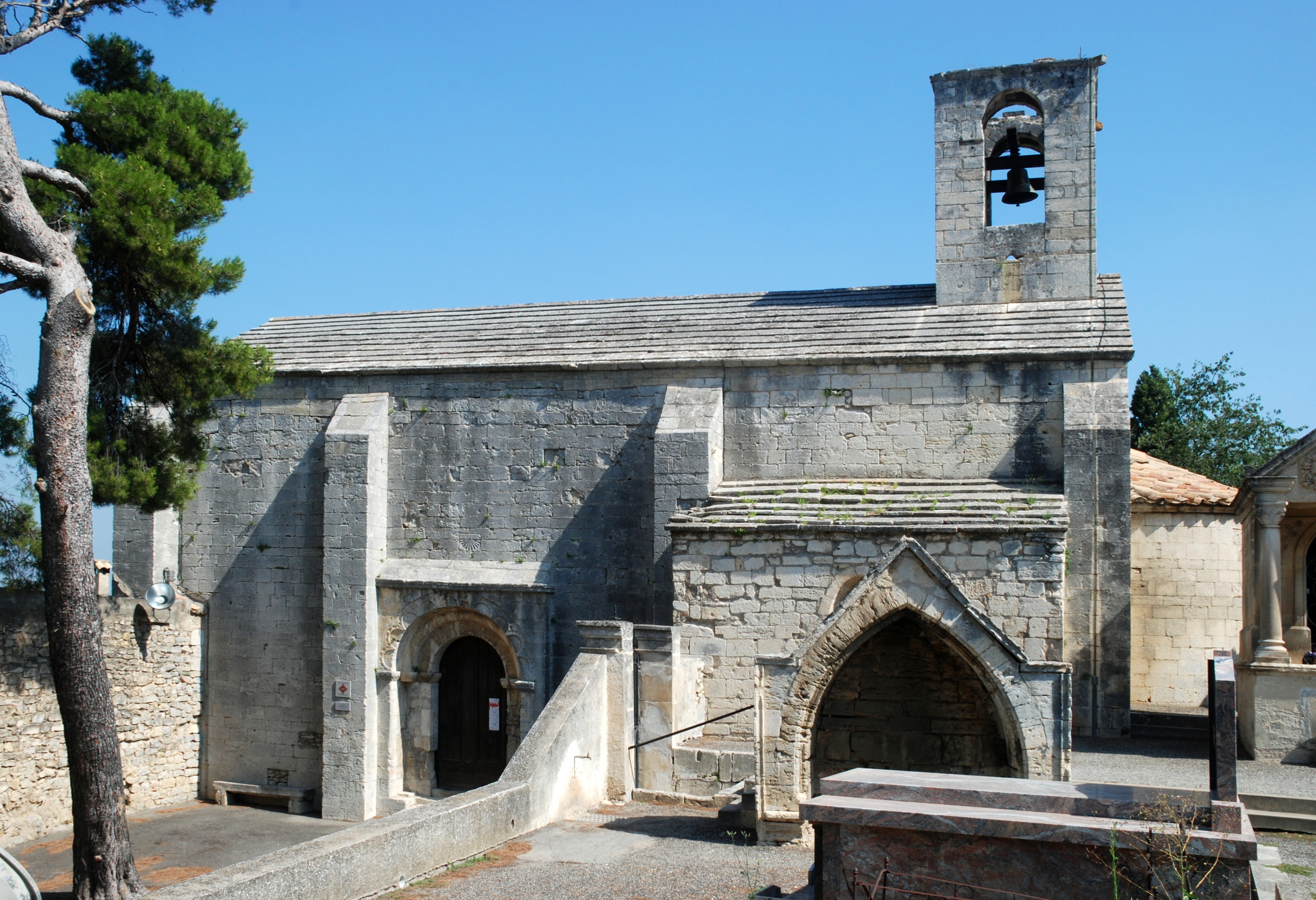 France - Provence - Boulbon - Saint-Marcellin